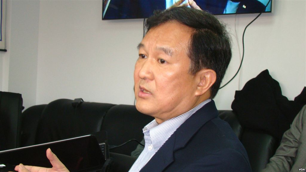 项小吉 (美国之音 宋德成拍摄)